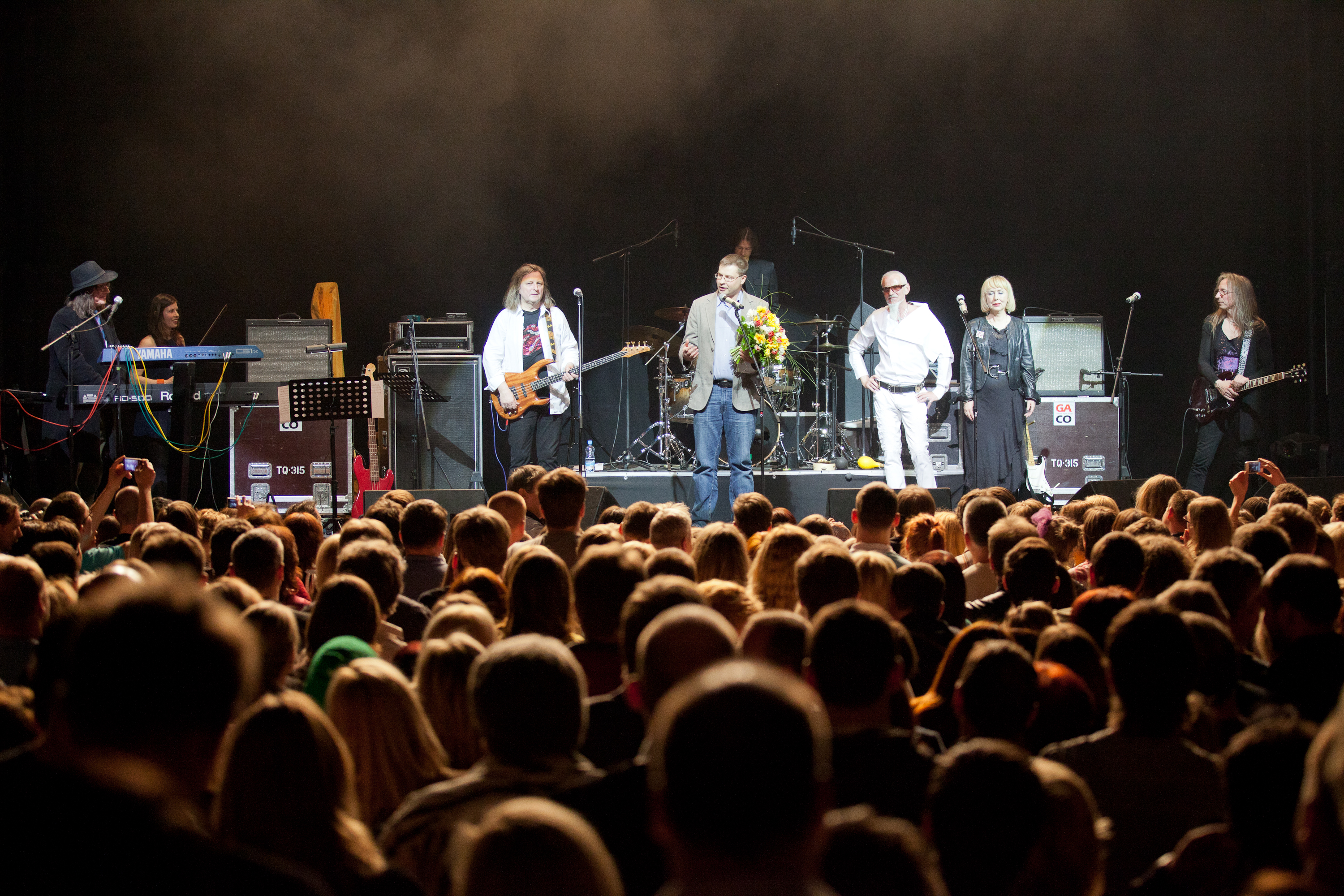 Foto: Toms Norde, Valsts kanceleja